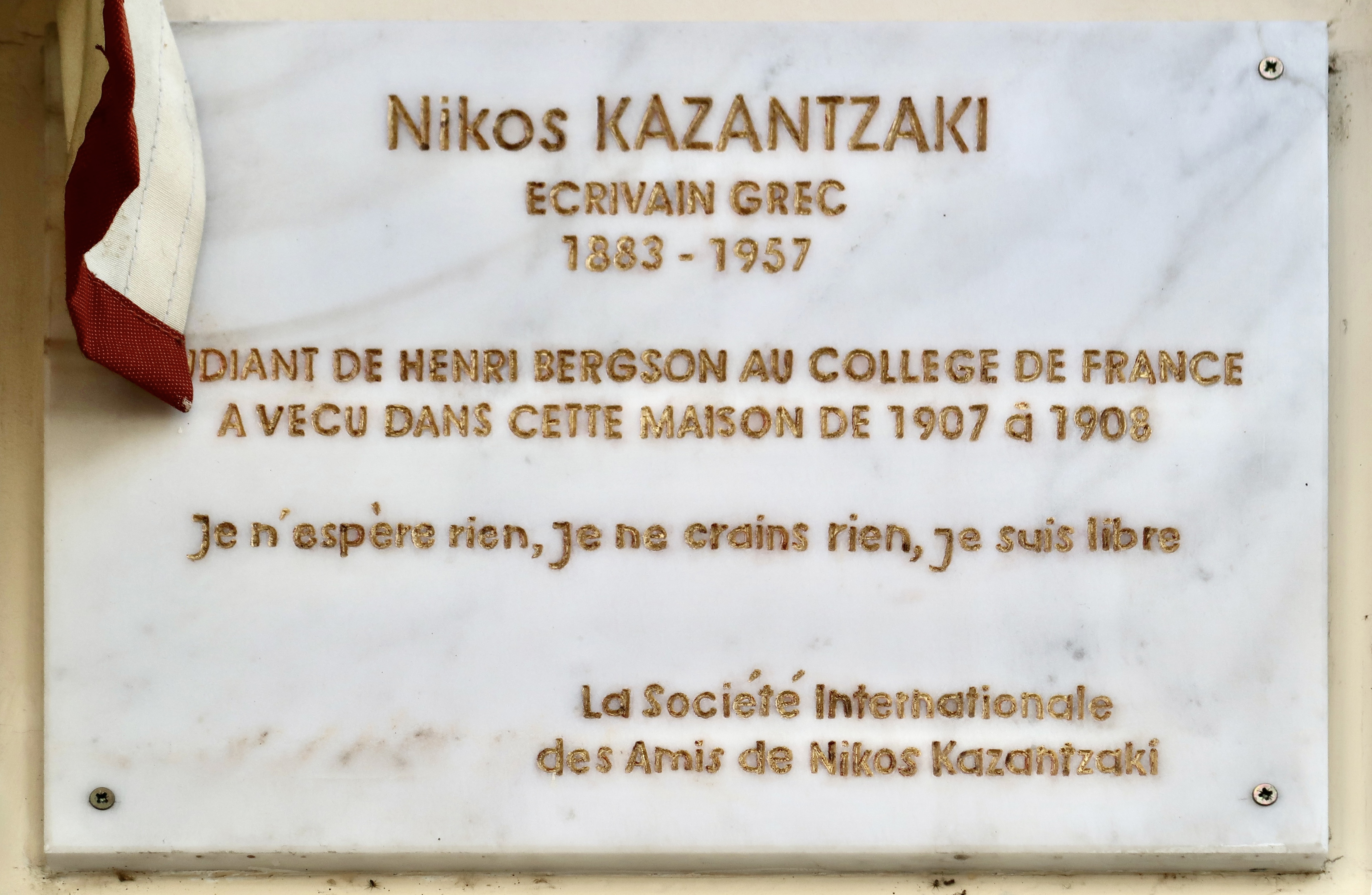 Plaque en hommage à Níkos Kazantzákis, 13 rue Du Sommerard (Paris, 5e).